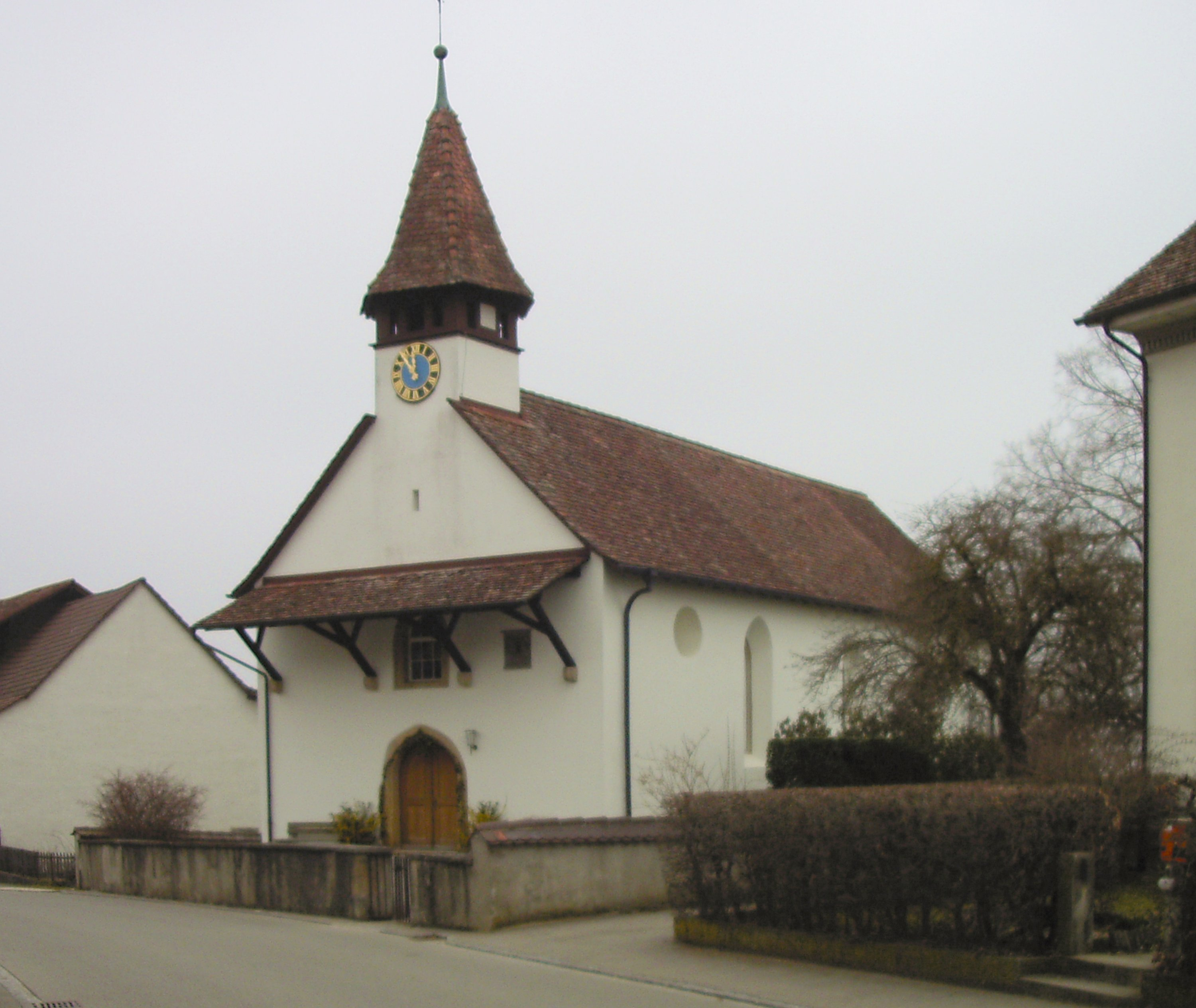 reformierte Kirche in Opfertshofen, Kanton Schaffhausen, Schweiz